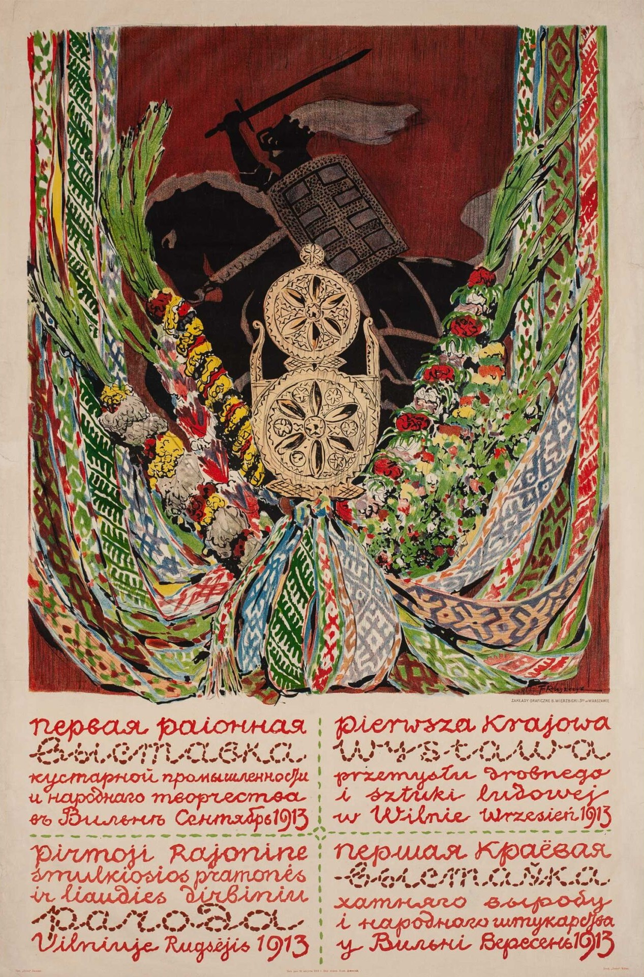 Плакат Ф. Рушчыца з гербам «Пагоня», прысвечаны выстаўцы ў Вільні Беларуская (тарашкевіца): Плякат Ф. Рушчыца з гербам «Пагоня» («Pahonia»), прысьвечаны выставе ў Вільні